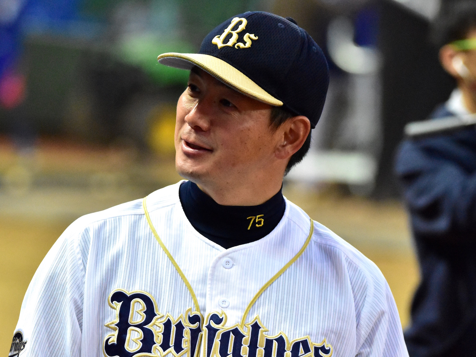 佐竹学（2016年12月17日、台中インターコンチネンタル野球場にて）